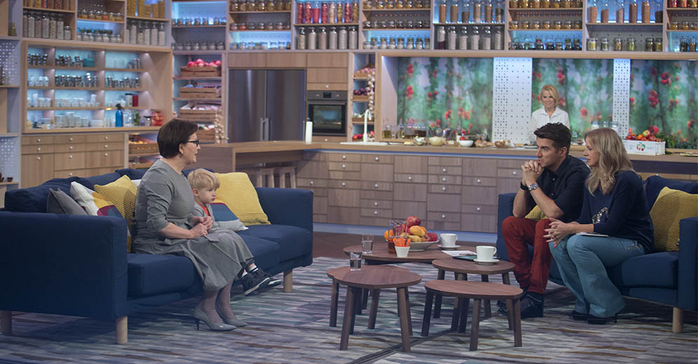 Premier Ewa Kopacz gościła w programie "Pytanie na śniadanie" (TVP2).